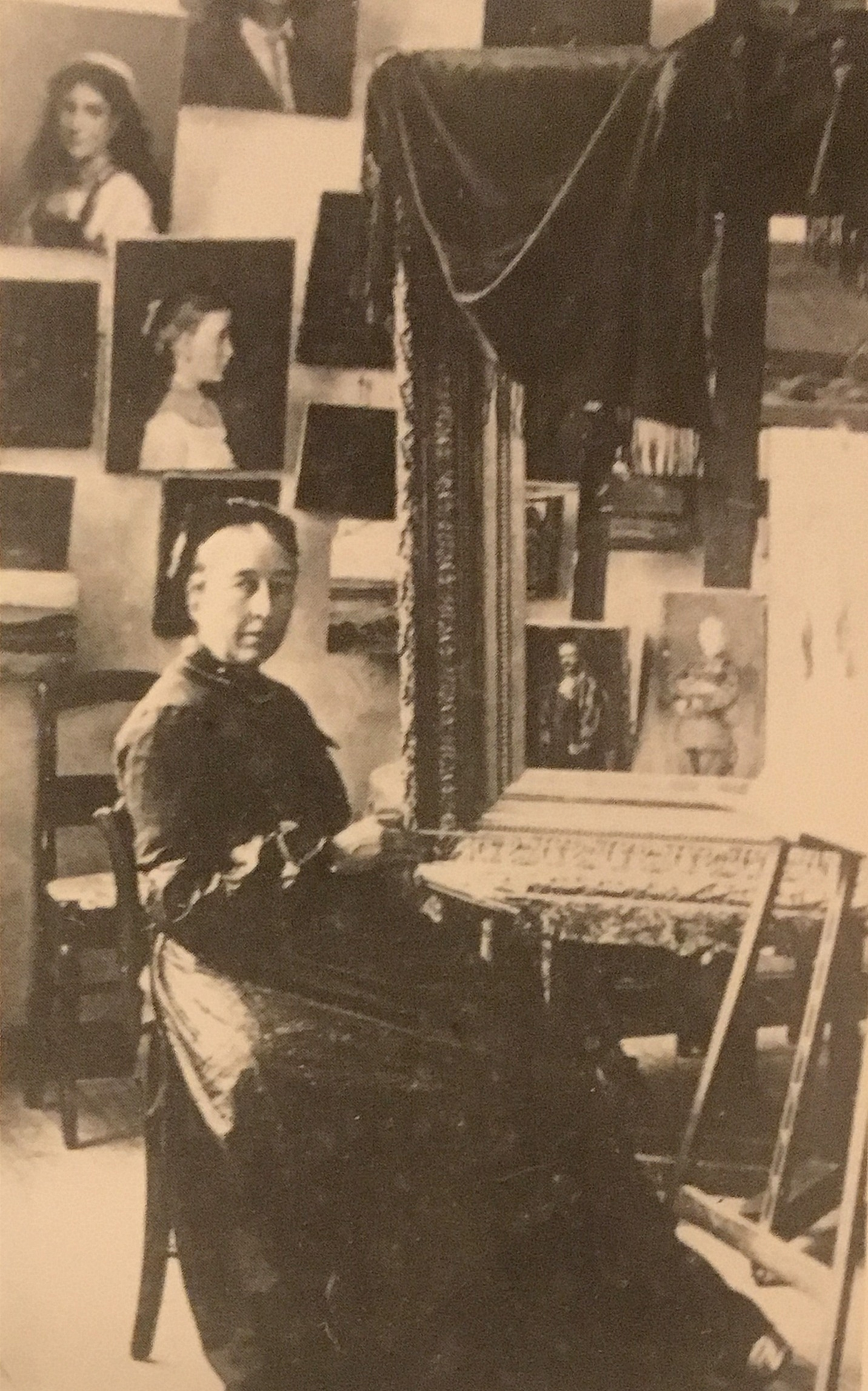 Eugénie Salanson dans son atelier